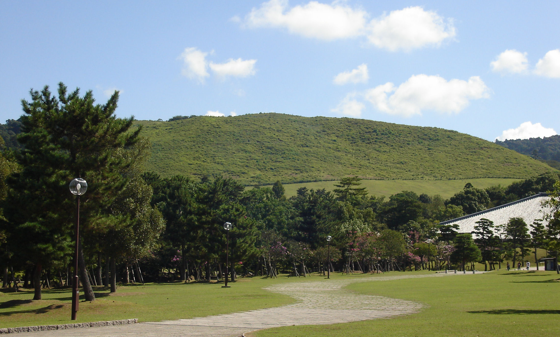 Wakakusa yama , nara Japan